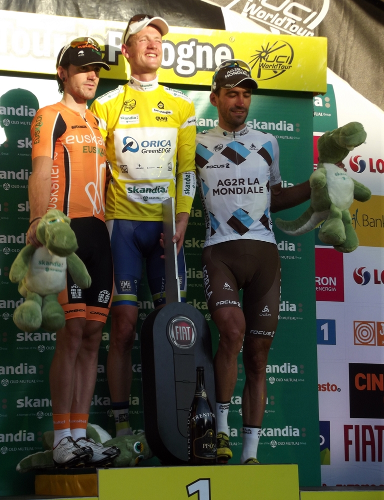 Zdjęcie zrobione podczas VII etapu 70. jubileuszowego Tour de Pologne w Krakowie.